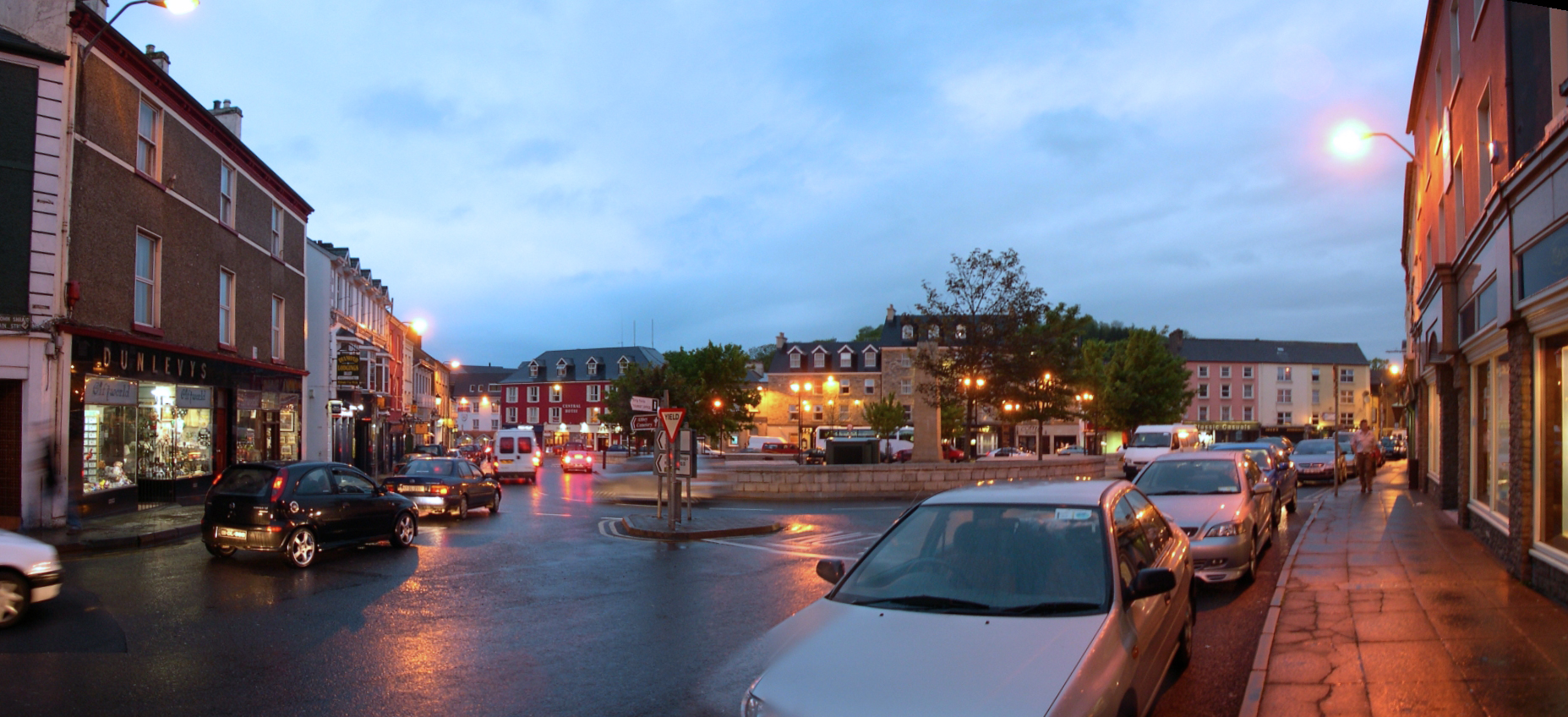 Co. Donegal, Ireland